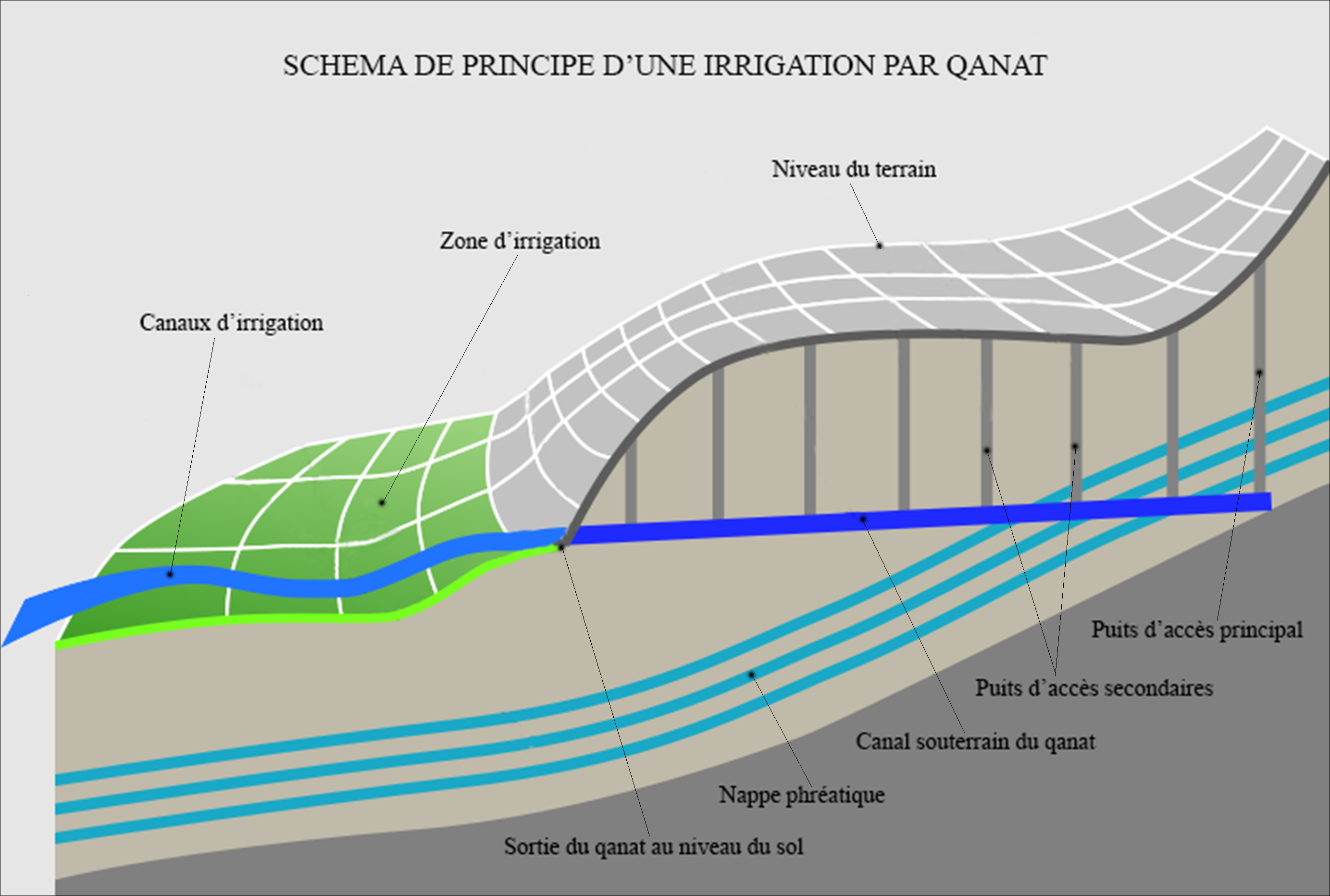 Schéma de principe d’un qanat pour alimentation d’un réseau d’irrigation.